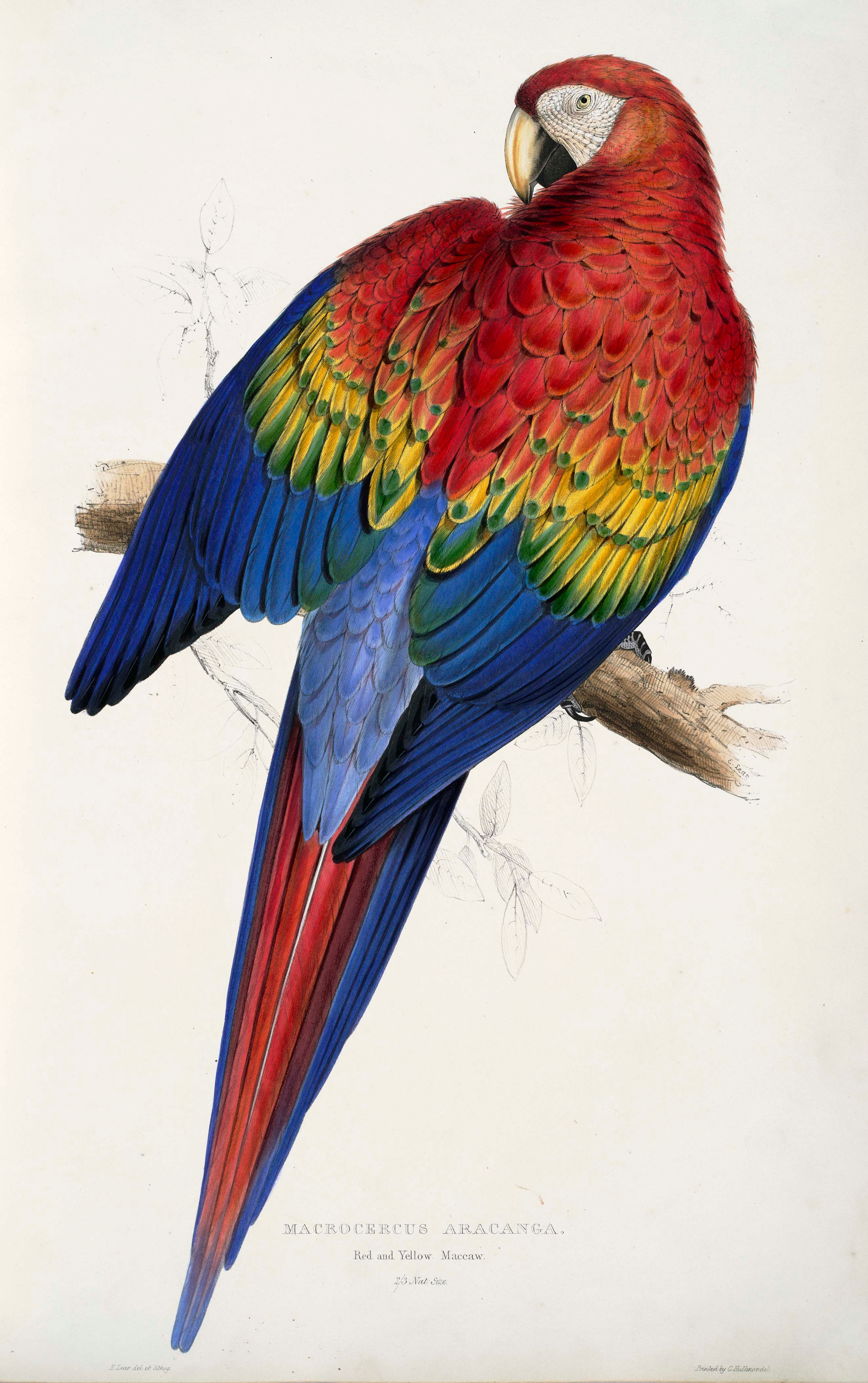 A parrot Macrocercus aracanga, now Ara macao